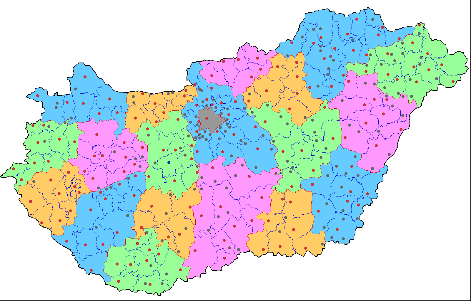 Magyarország közigazgatási felosztása, megyék, kistérségek, kistérségi székhelyek, városok, 2011. január 1.